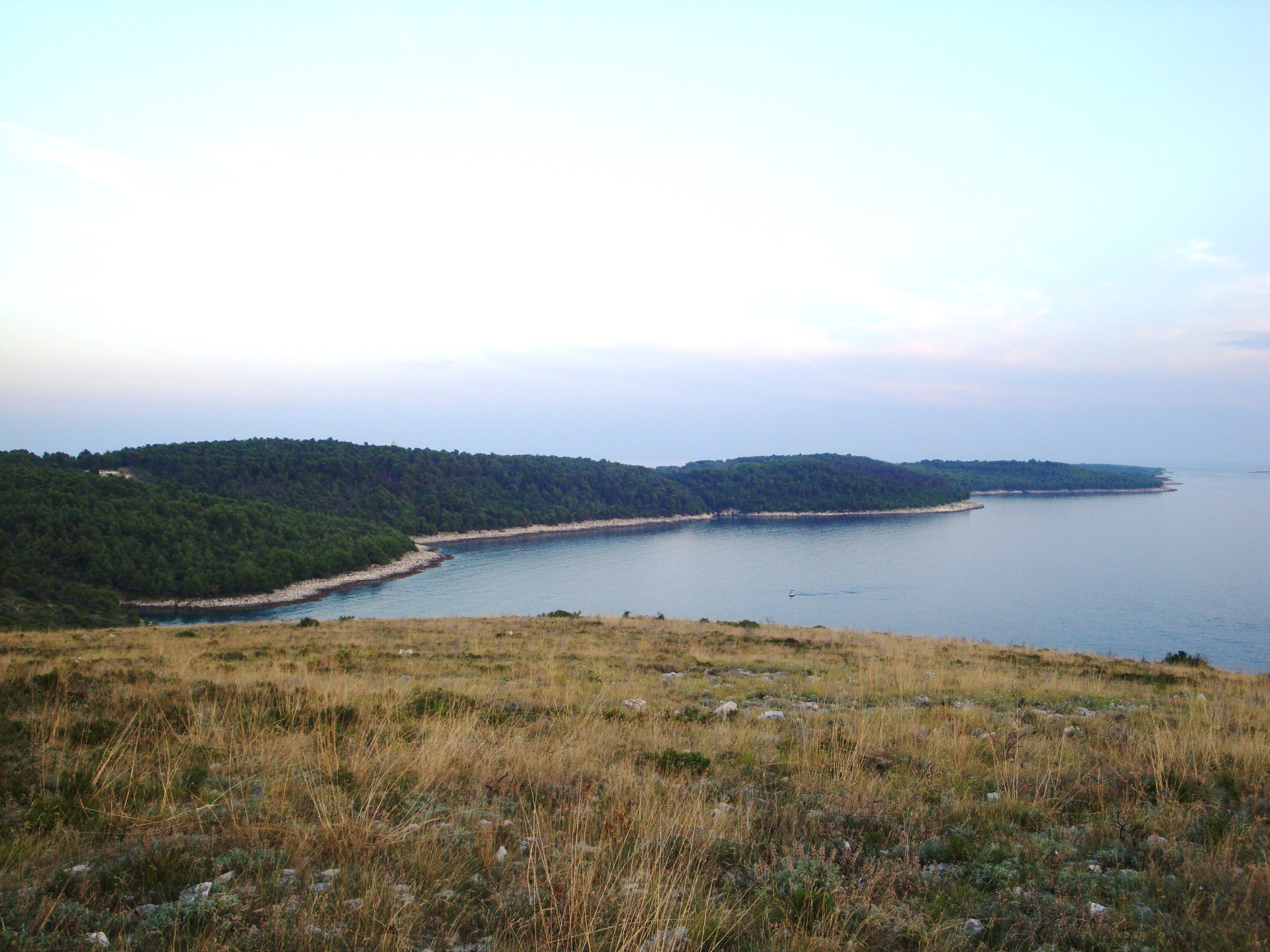 Pogled na vzhodni del polotoka Kamenjak, Istra, Croatia